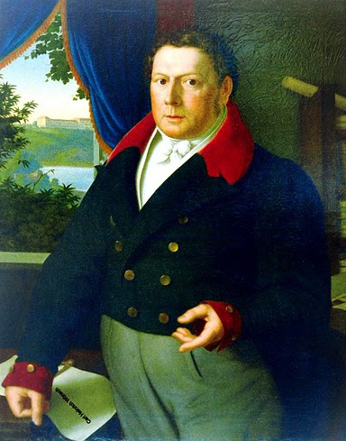 Carl Heirich Wünsch (1779—1855), Architekt und Baumeister